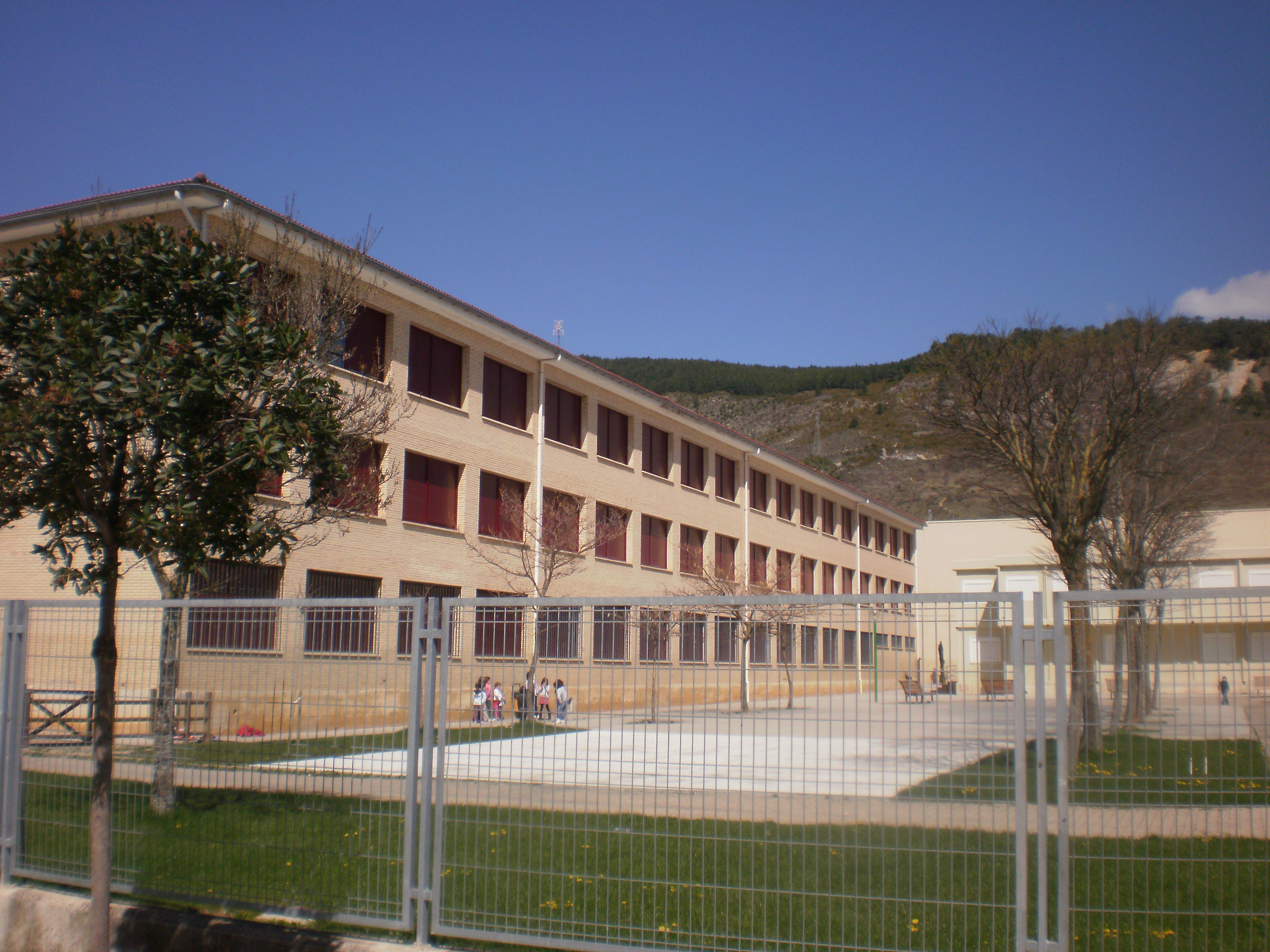 Colegio Público Ezcaba de Ansoáin (Navarra-España)